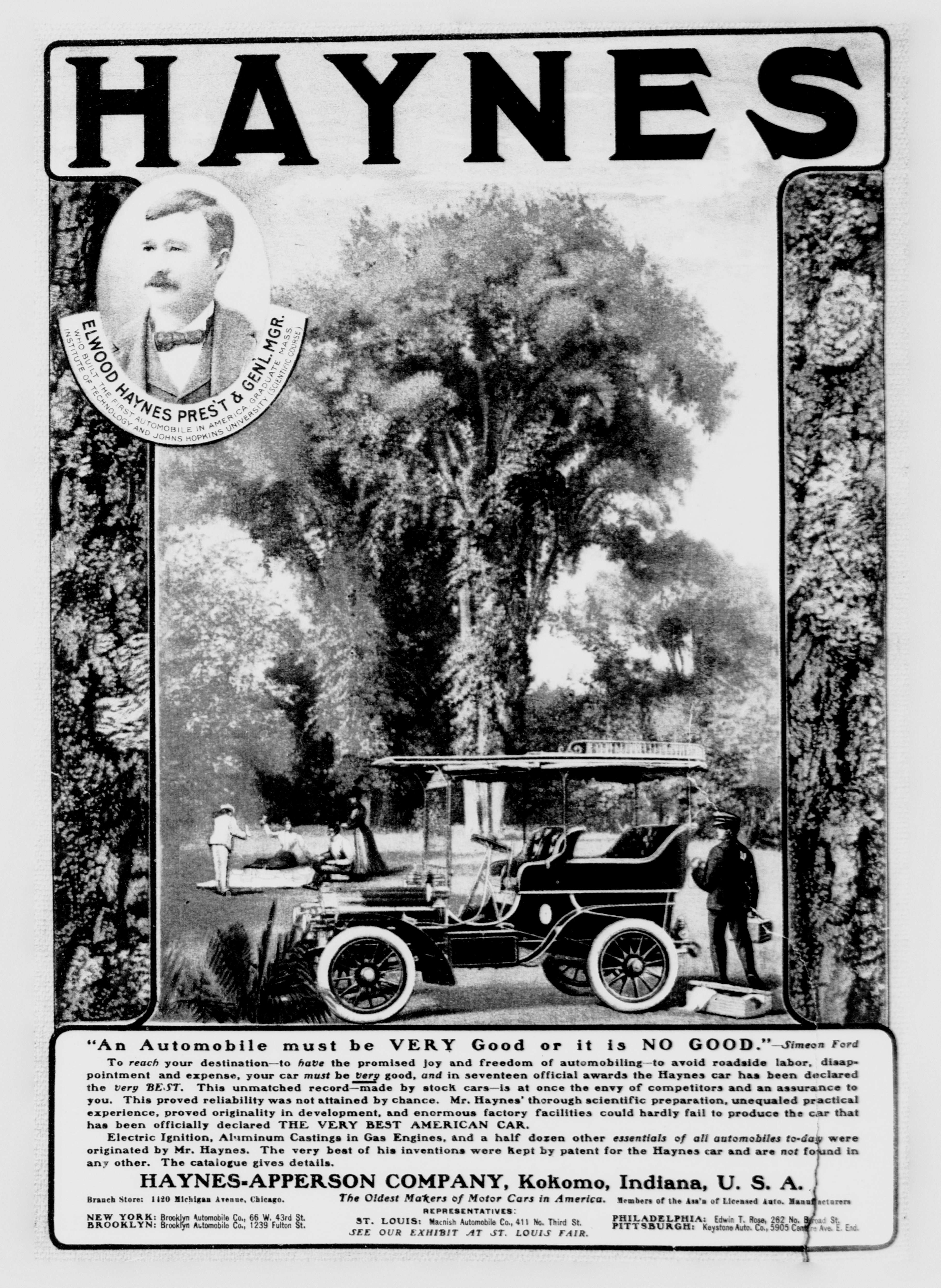 Haynes Apperson Automobile Advertisement